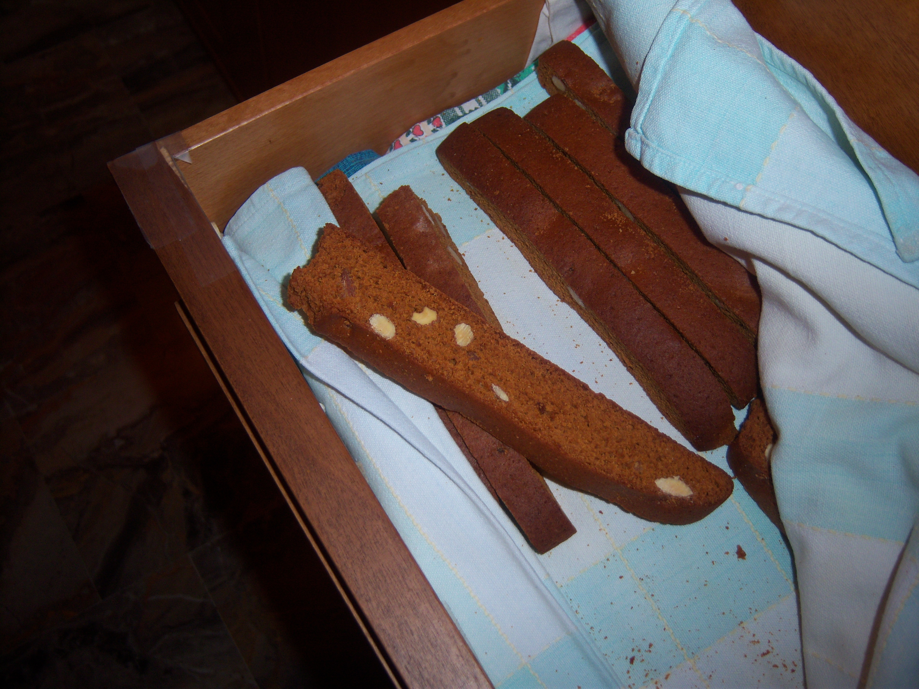 Mastazzuoli